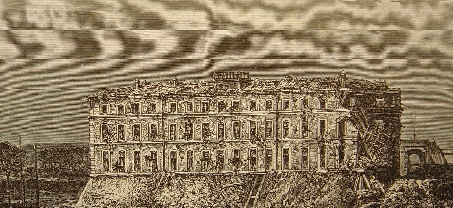 La caserne du Fort de Montrouge, après le bombardement par les Prussiens.